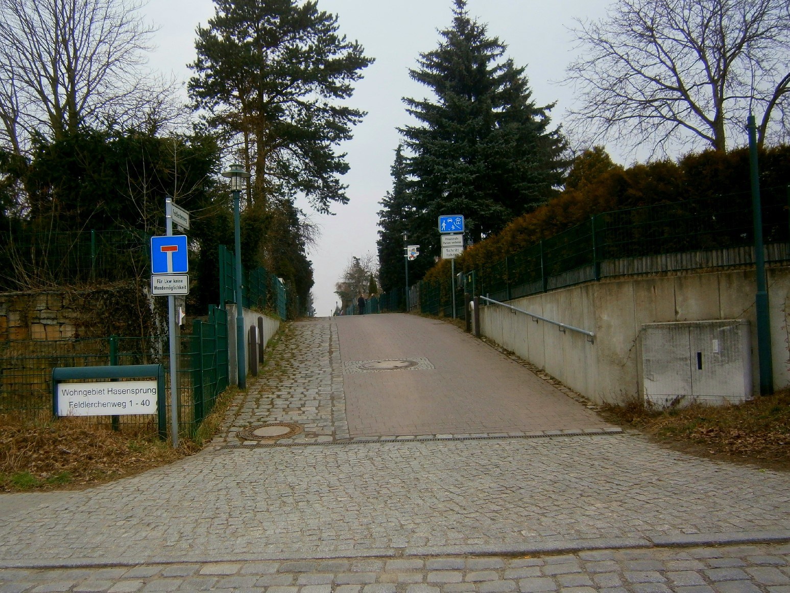 Alter Bernauer Heerweg ist eine Straße in Berlin-Lübars. Der westliche der drei Wege in die Wohnsiedlung Hasengrund besitzt als nördlich abgehende Straße einen eigenen gewidmeten Namen: Feldlerchenweg. (Bild falsch benannt)